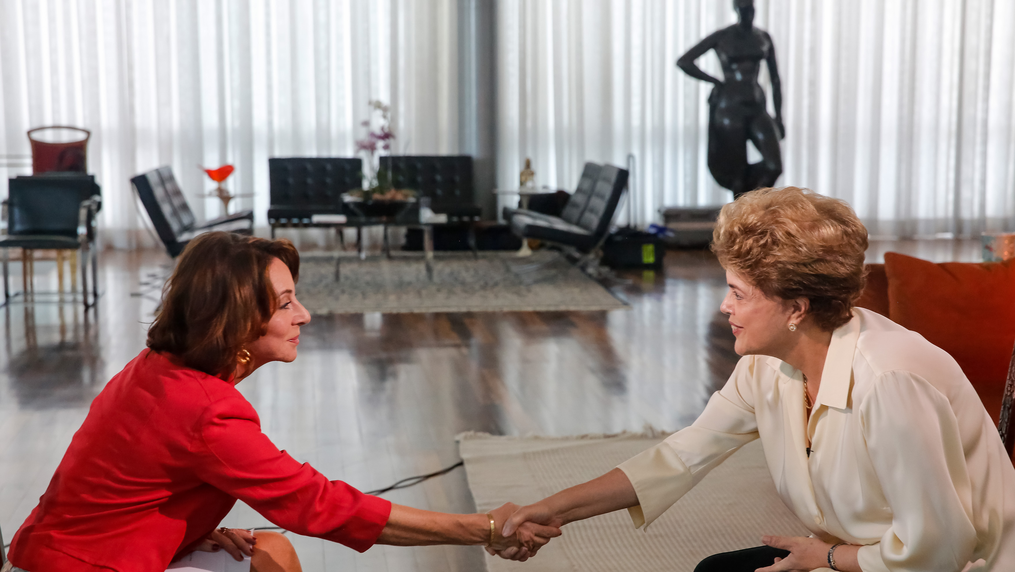 BrasÃ-lia - DF, 01/06/2016. Presidenta Dilma Rousseff durante Entrevista para Al Jazeera no Pal´cio da Alvorada. Foto: Roberto Stuckert Filho/PR